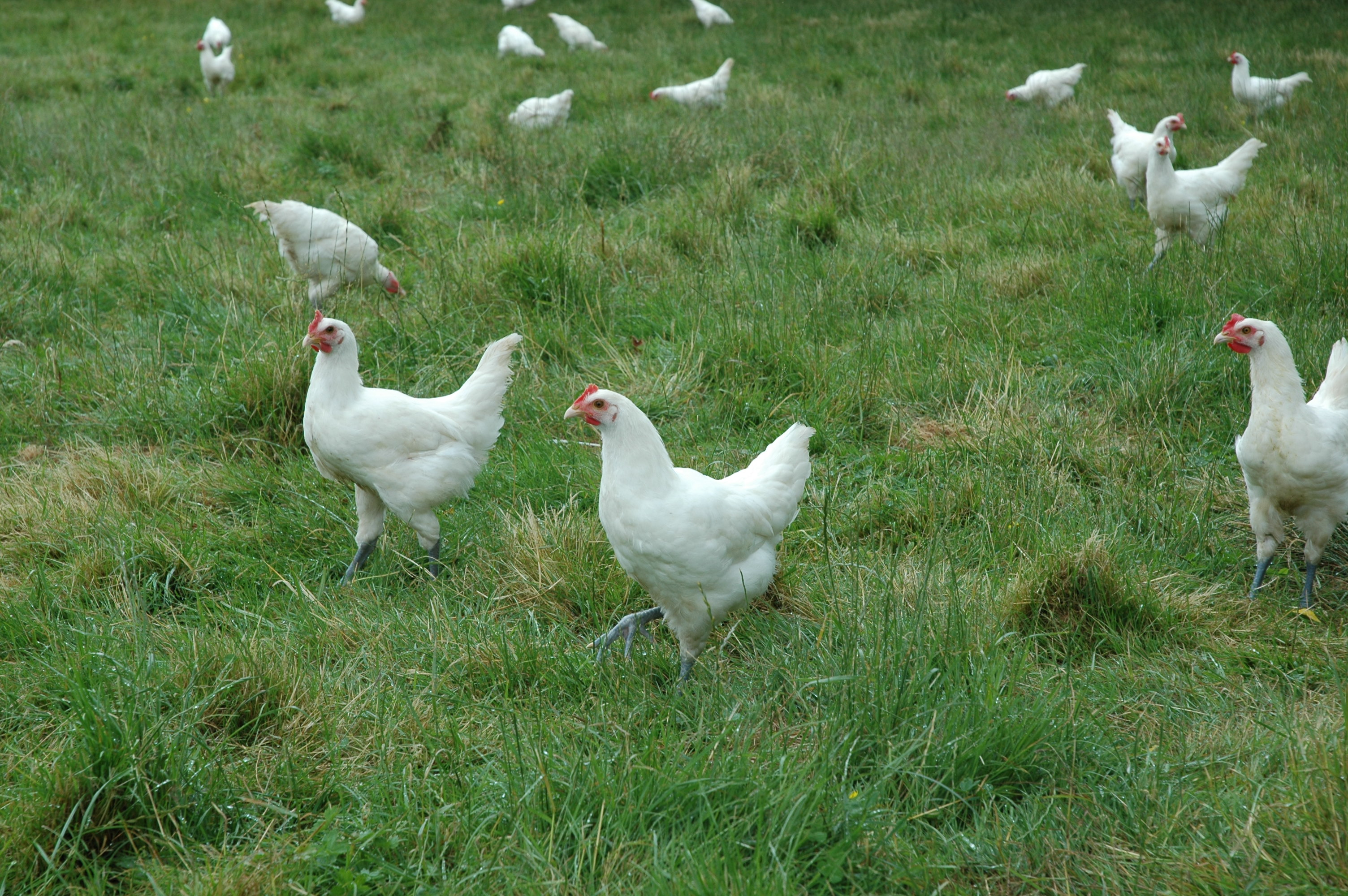 Volailles de Bresse